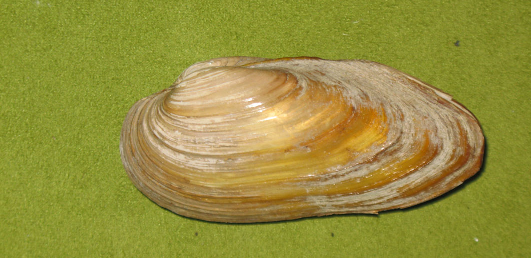 Unio pictorum (Linné, 1757)